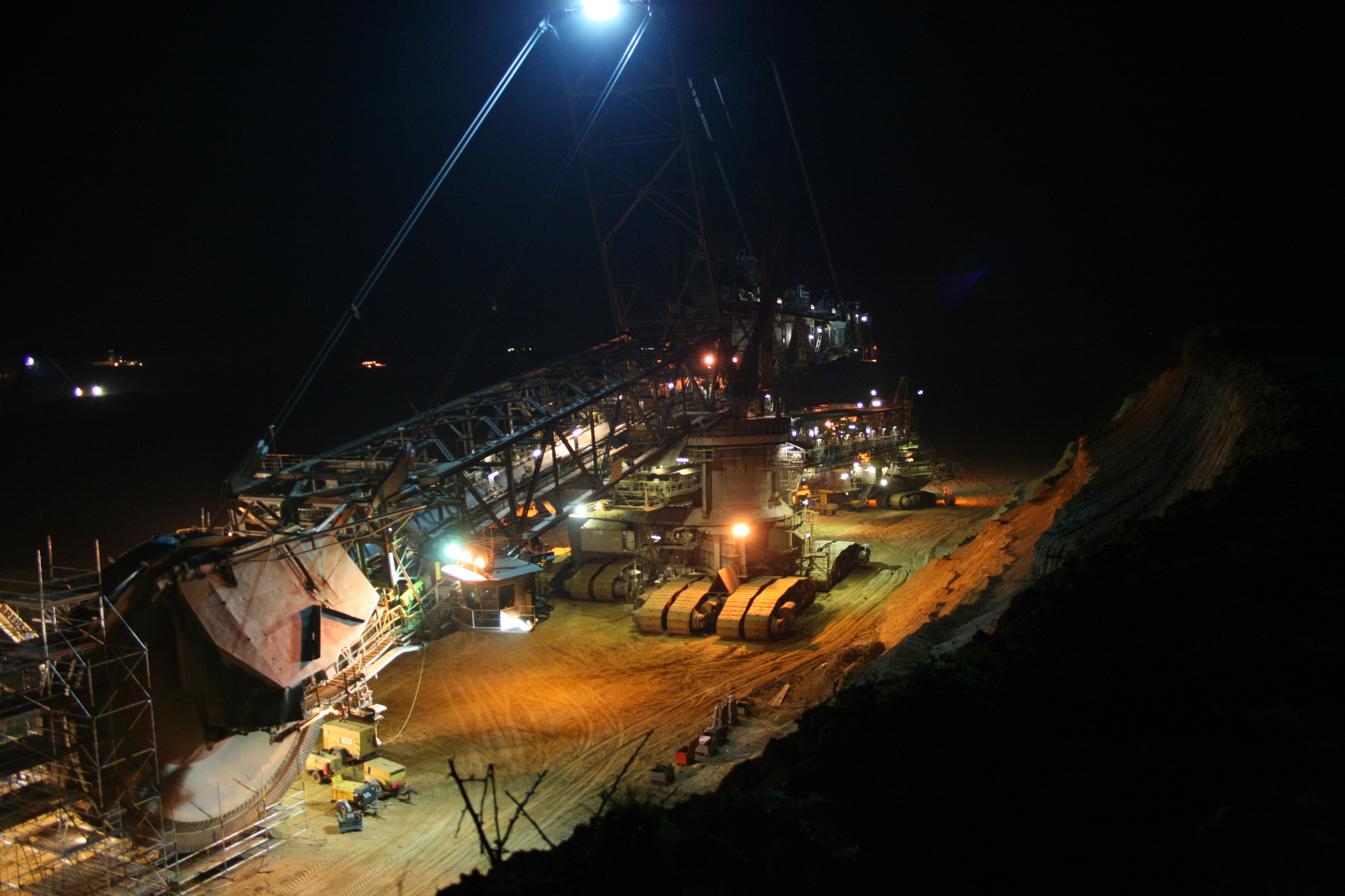 Schaufelradbagger 258 bei Nacht auf dem Abbaugebiet Garzweiler, Wartungsarbeiten